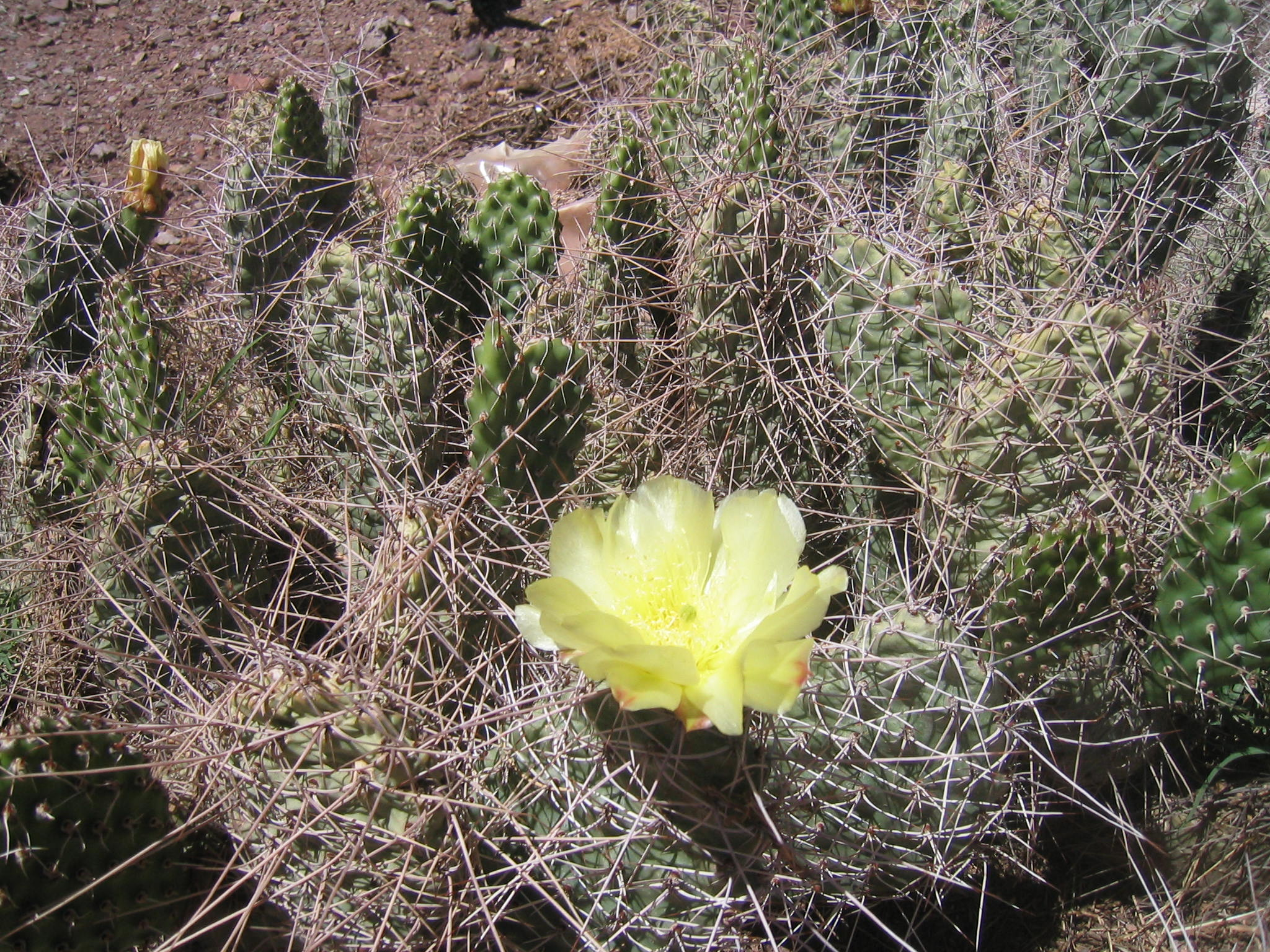 Opuntia sulphurea subsp. spinibarbis